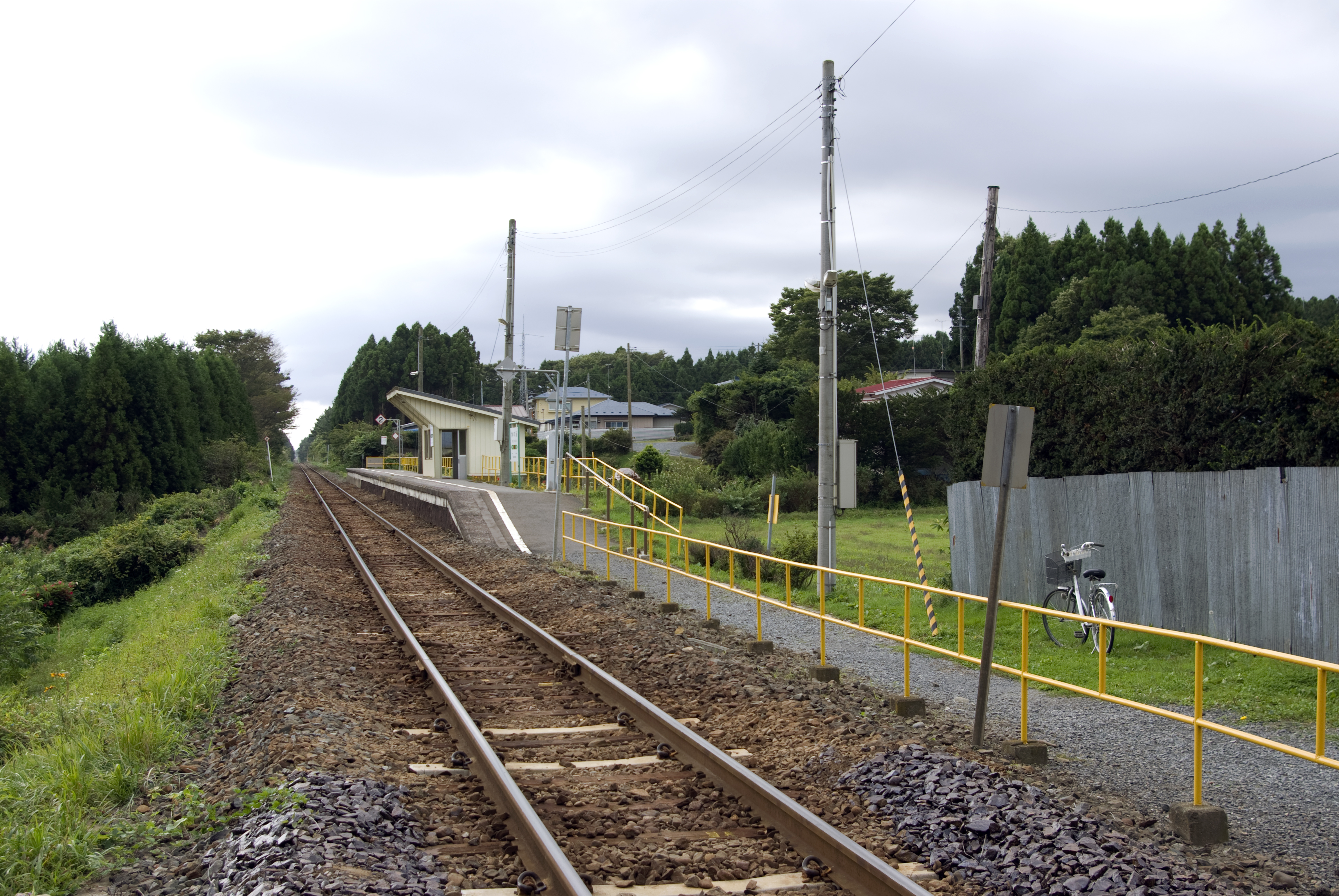 JR八戸線角の浜駅